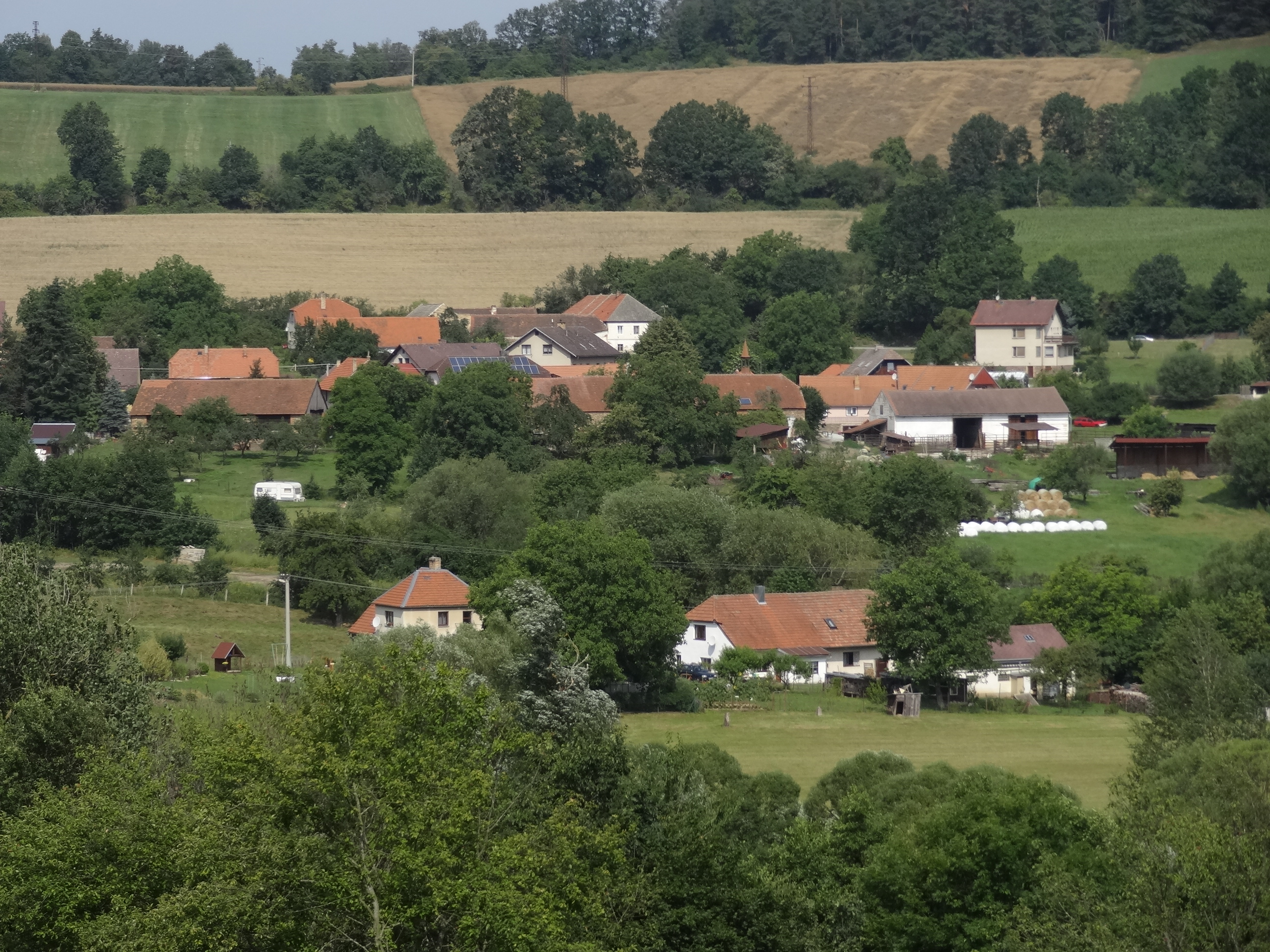 Ostrov (u Prachatic) - celkový pohled od JV